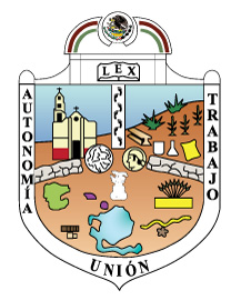 Escudo de armas de Ecatepec